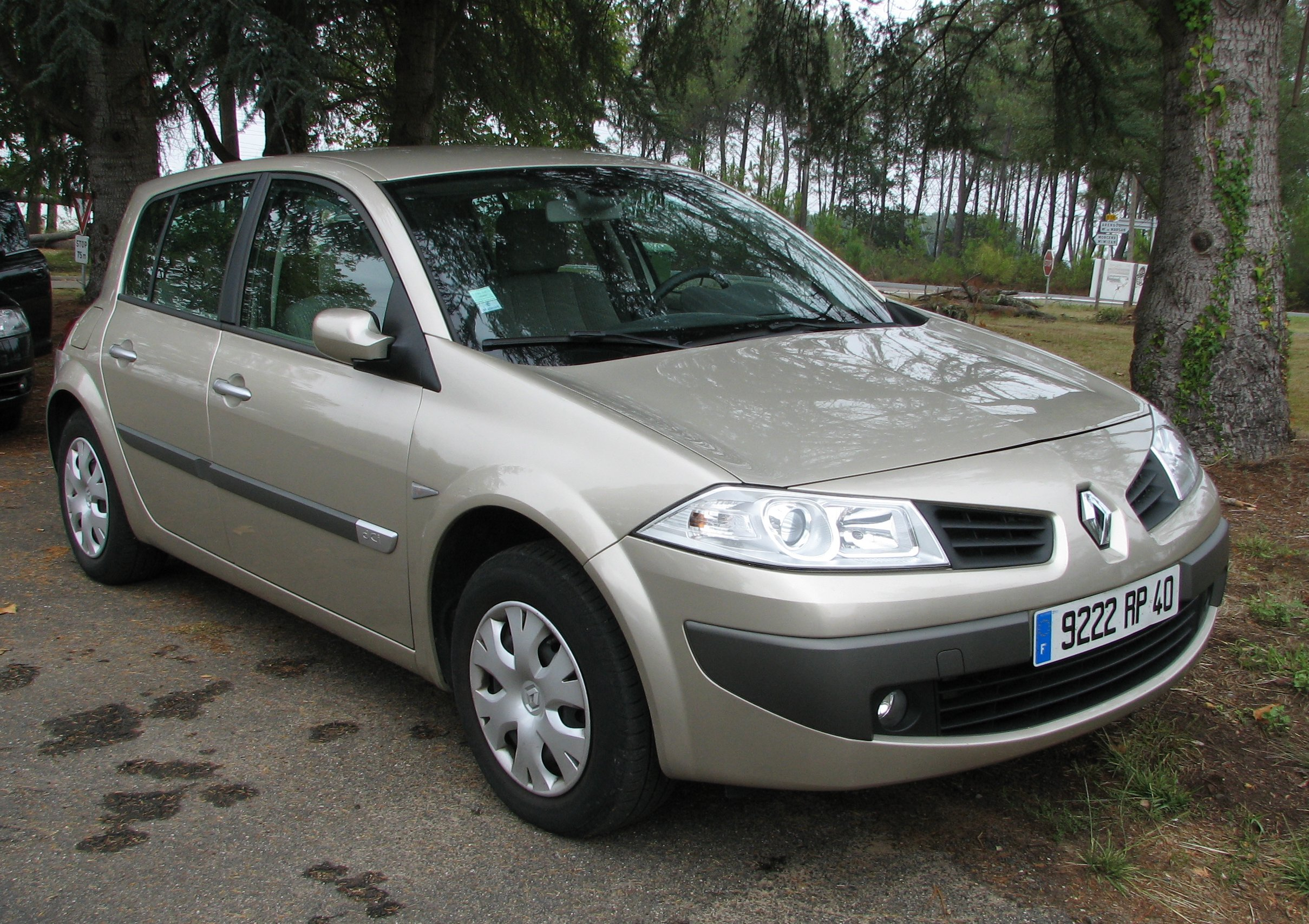 Renault Mégane 1.9 dCi hatchback.